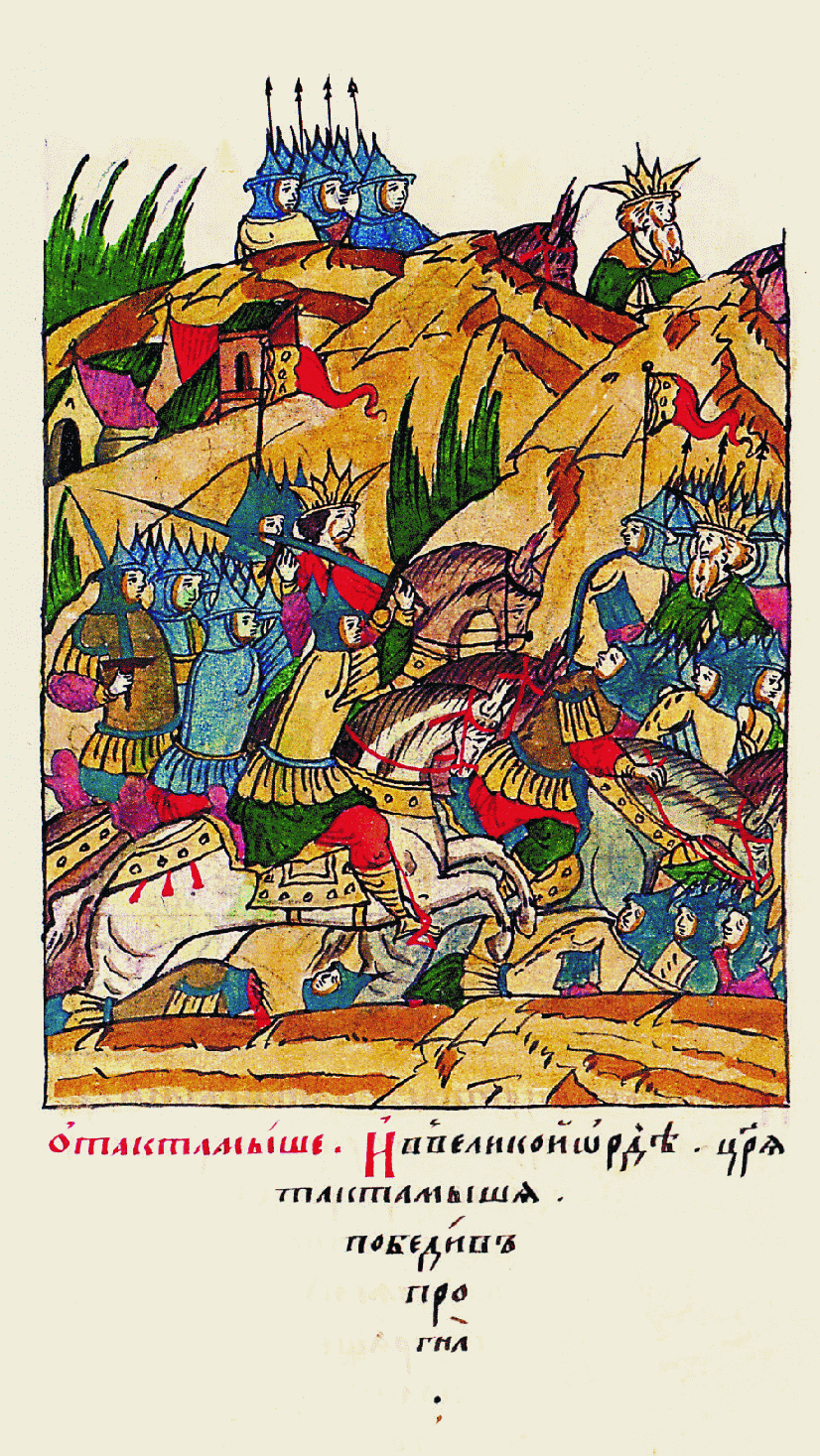 О Тохтамыше. В Ве- ликой Орде, победив, прогнал царя Тохта- мыша.